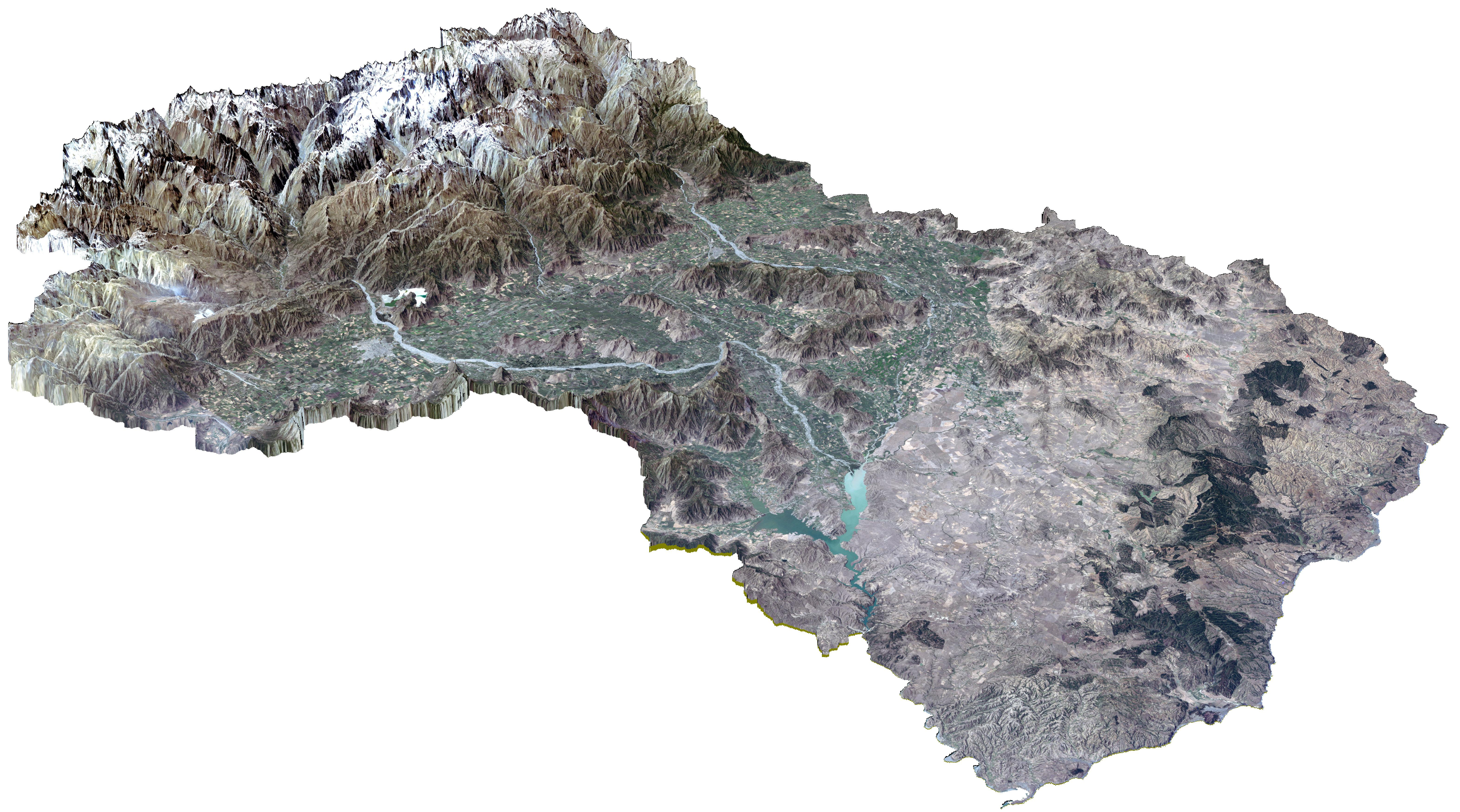 Valle Cachapoal Chile